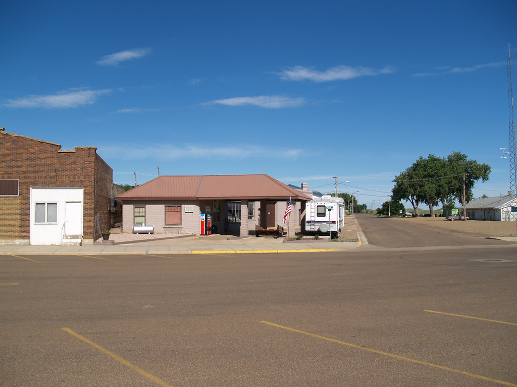 Hettinger, North Dakota. From .